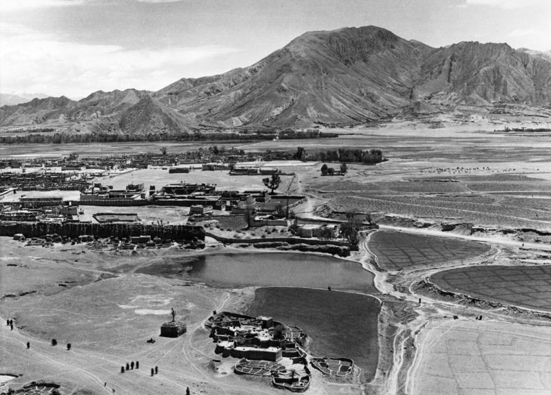 Tibetexpedition, Bilck auf Shigatse Schigatse, Stadtpanorama (zweiteilig) [Shigatse, Schigatse]